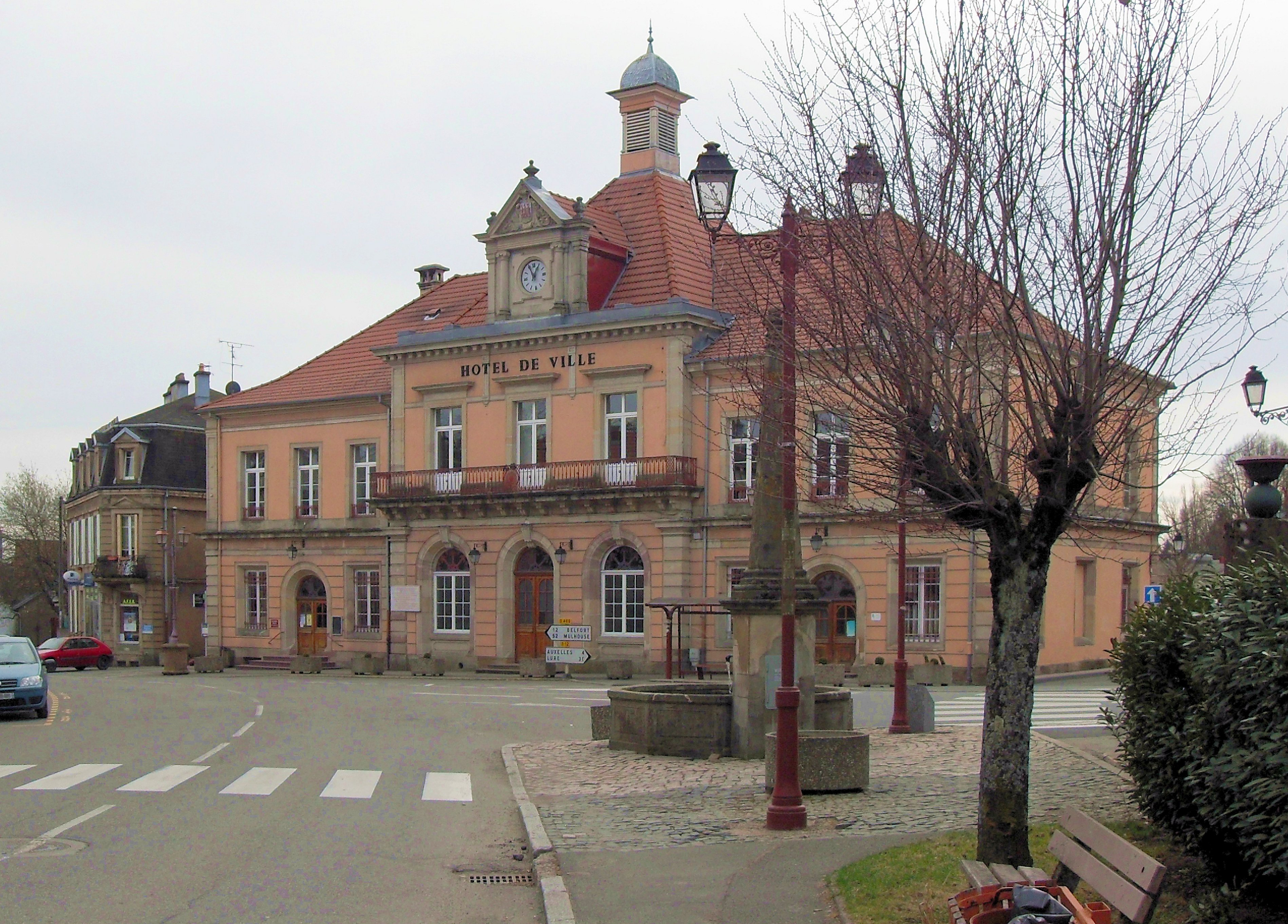 L'hôtel de ville de Giromagny